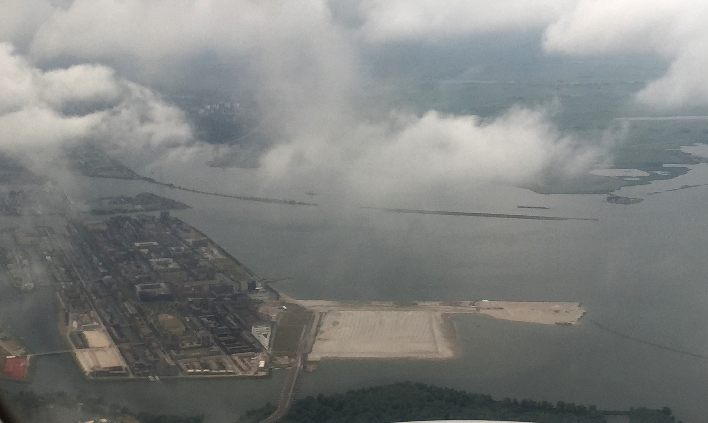 Het net opgespoten Centrumeiland van de Amsterdamse wijk IJburg. Juli 2015